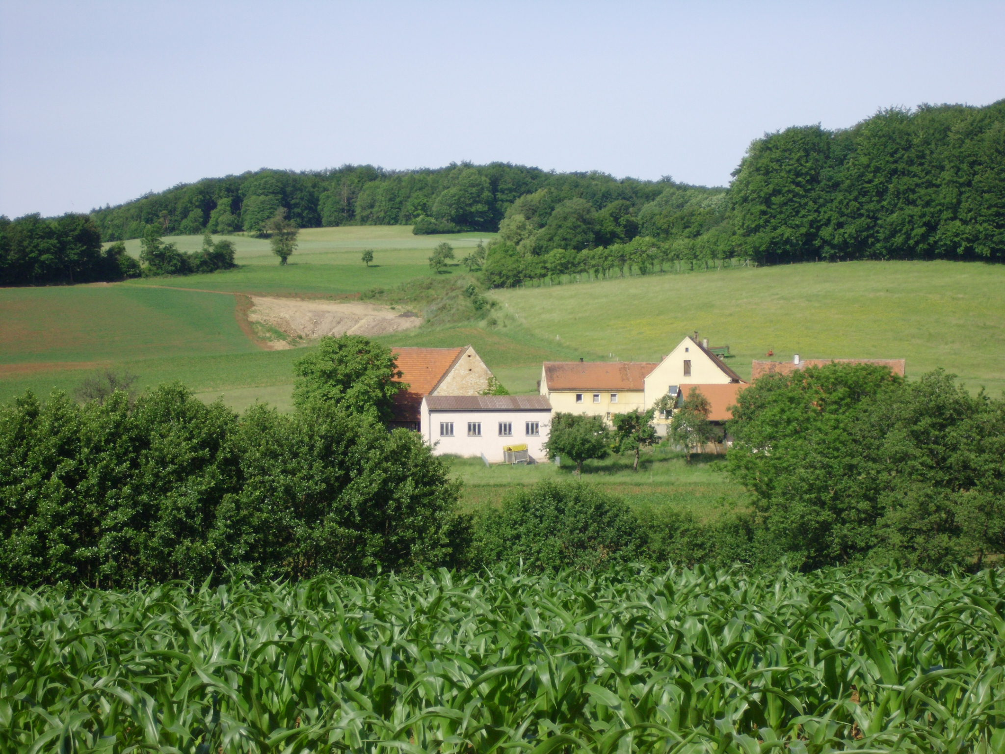 Gärtnershof, Ortsteil des Marktes Heidenheim im mittelfränkischen Landkreis Weißenburg-Gunzenhausen